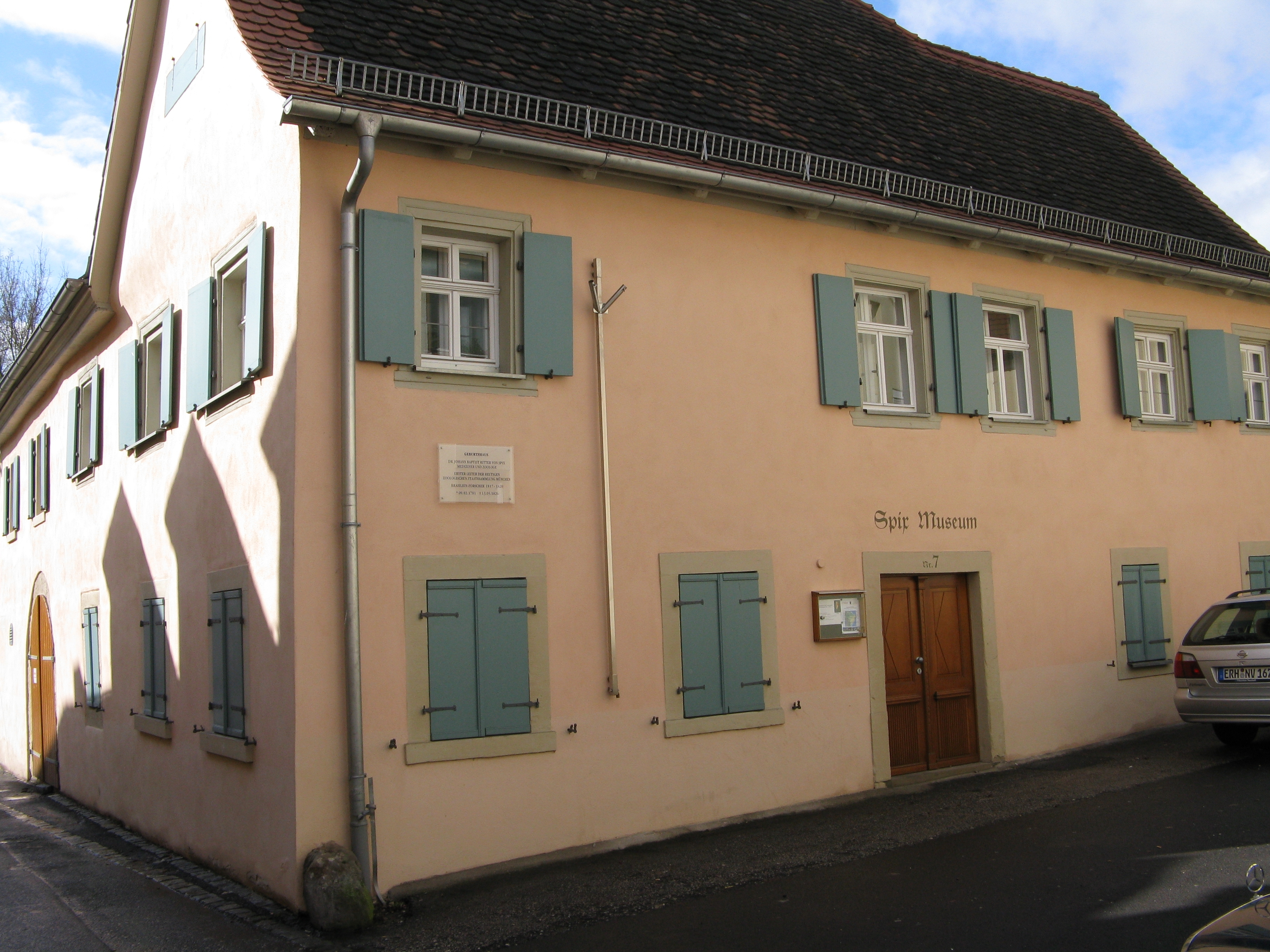 Geburtshaus von Johann Baptist Ritter von Spix, in Höchstadt an der Aisch, Badgasse 7, jetzt Spix-Museum